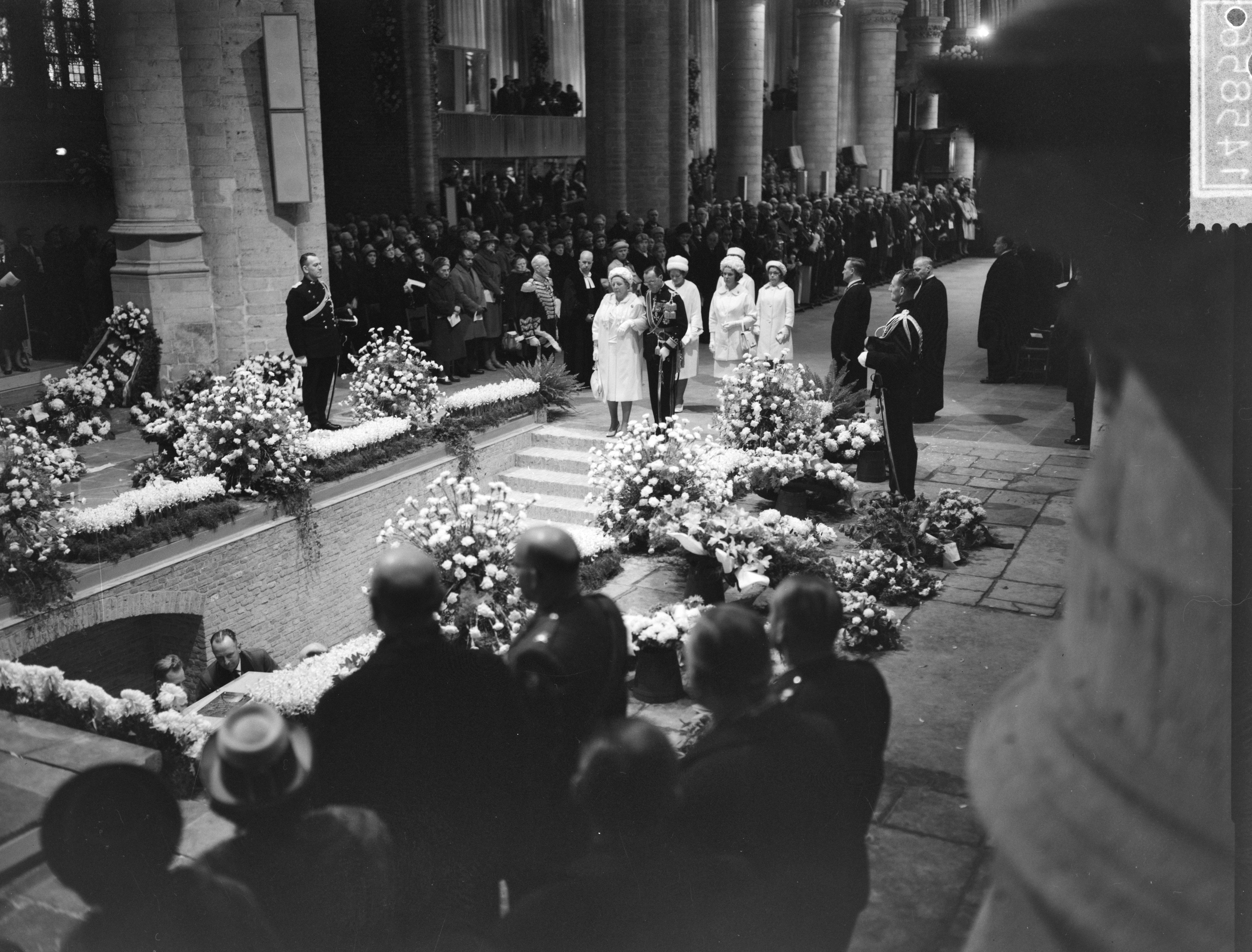 Collectie / Archief : Fotocollectie Anefo Reportage / Serie : [ onbekend ] Beschrijving : Uitvaart prinses Wilhelmina , Koningin Juliana en prins Bernhard gaan grafkelder in, daarachter de prinsessen Datum : 8 december 1962 Trefwoorden : Uitvaarten, grafkelders Persoonsnaam : Bernhard, prins, Juliana, koningin, Wilhelmina, prinses Fotograaf : Bilsen, Joop van / Anefo Auteursrechthebbende : Nationaal Archief Materiaalsoort : Negatief (zwart/wit) Nummer archiefinventaris : bekijk toegang 2.24.01.04 Bestanddeelnummer : 914-5856